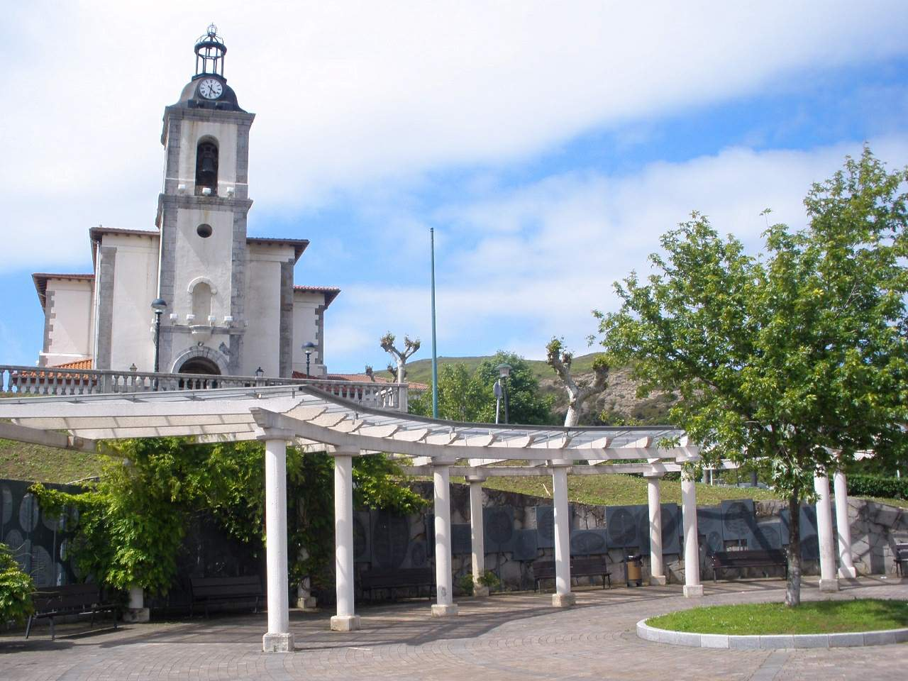 Iglesia de San Román, Zierbena (Vizcaya)